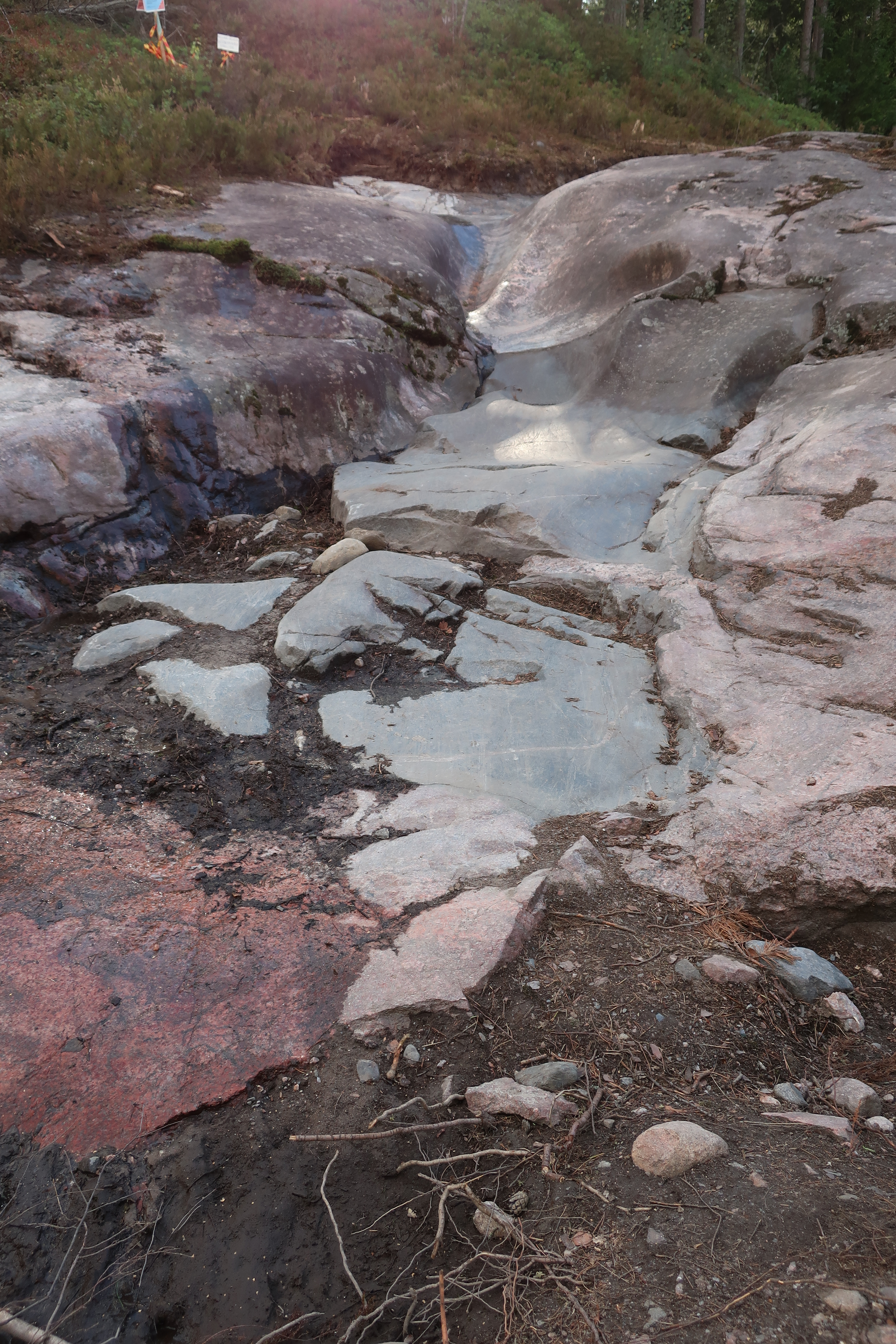 Yleiskuva Helsingin Viilarintien hiidenkourun paikasta, joka on Helsingin Vartiokylässä, Viilarintien eteläpuolella Roihupellon alueella